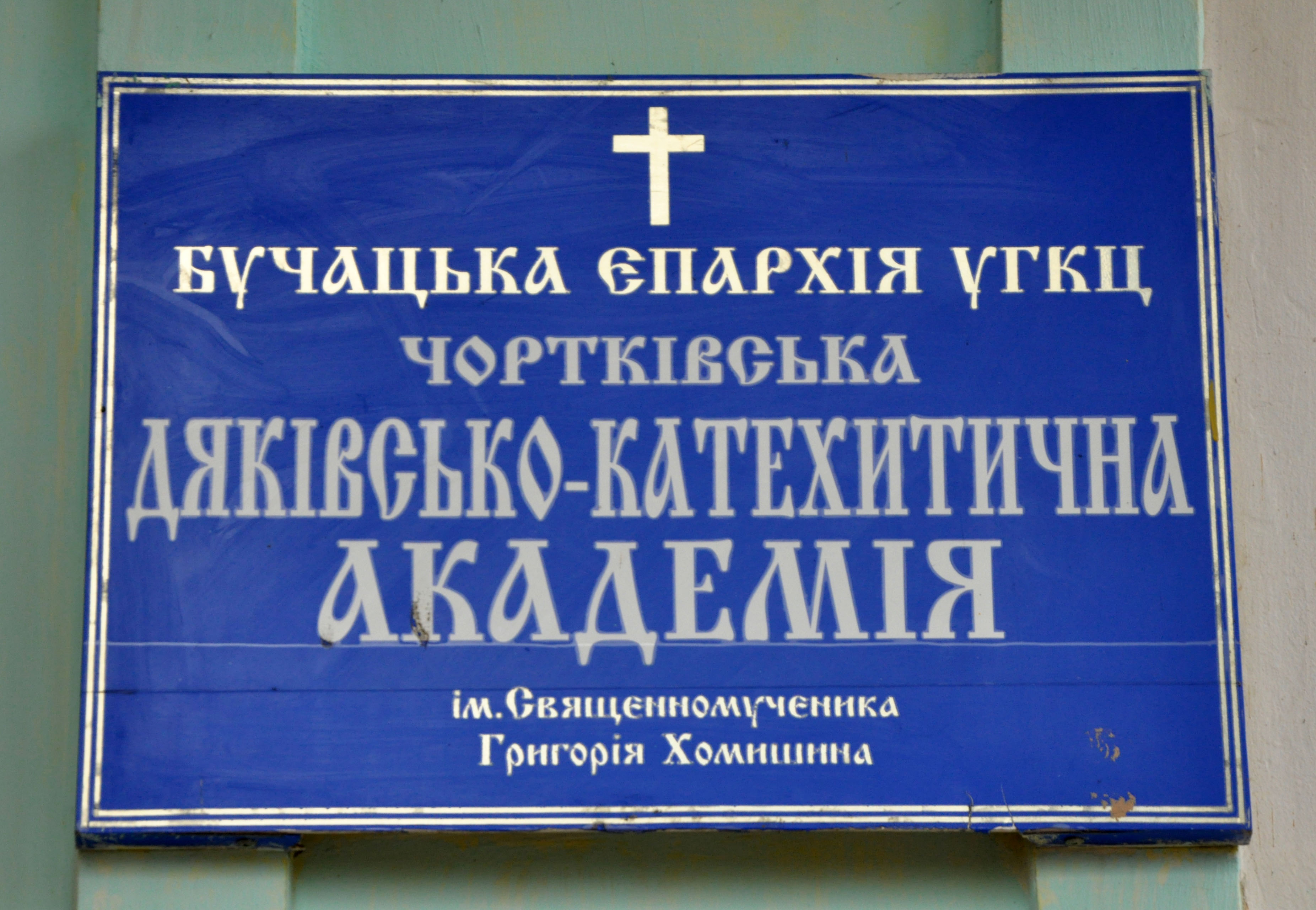 Вивіска на фасаді Чортківського дяківсько-катехитичного інституту імені священномученика (єпископа) Григорія Хомишина в місті Чорткові Тернопільської області України.